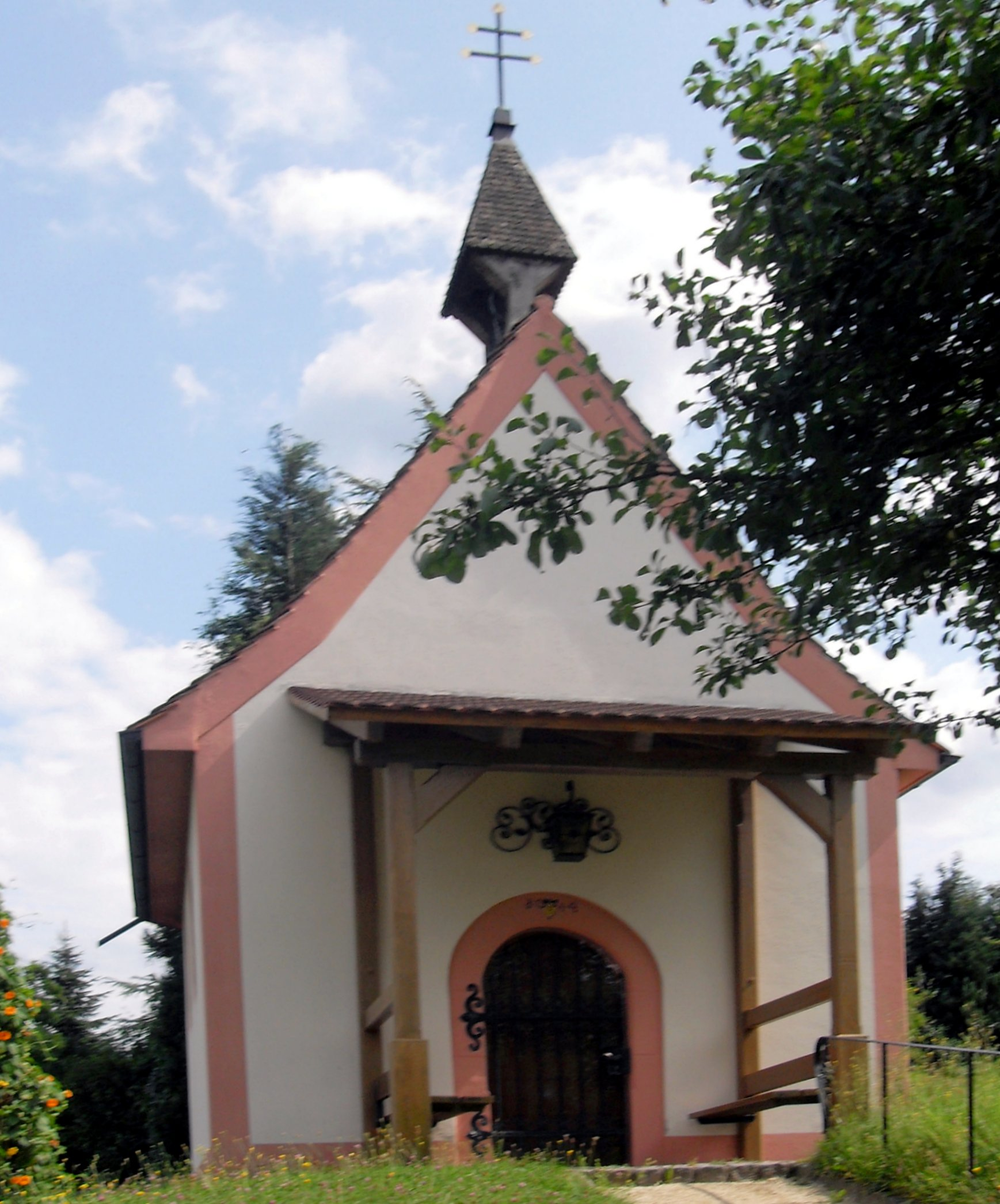 St. Leonhardts Kapelle in Wallhausen, Ortschaft Dettingen-Wallhausen, Stadt Konstanz